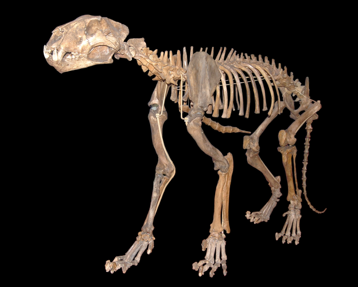 Naturhistorisches Museum Wien